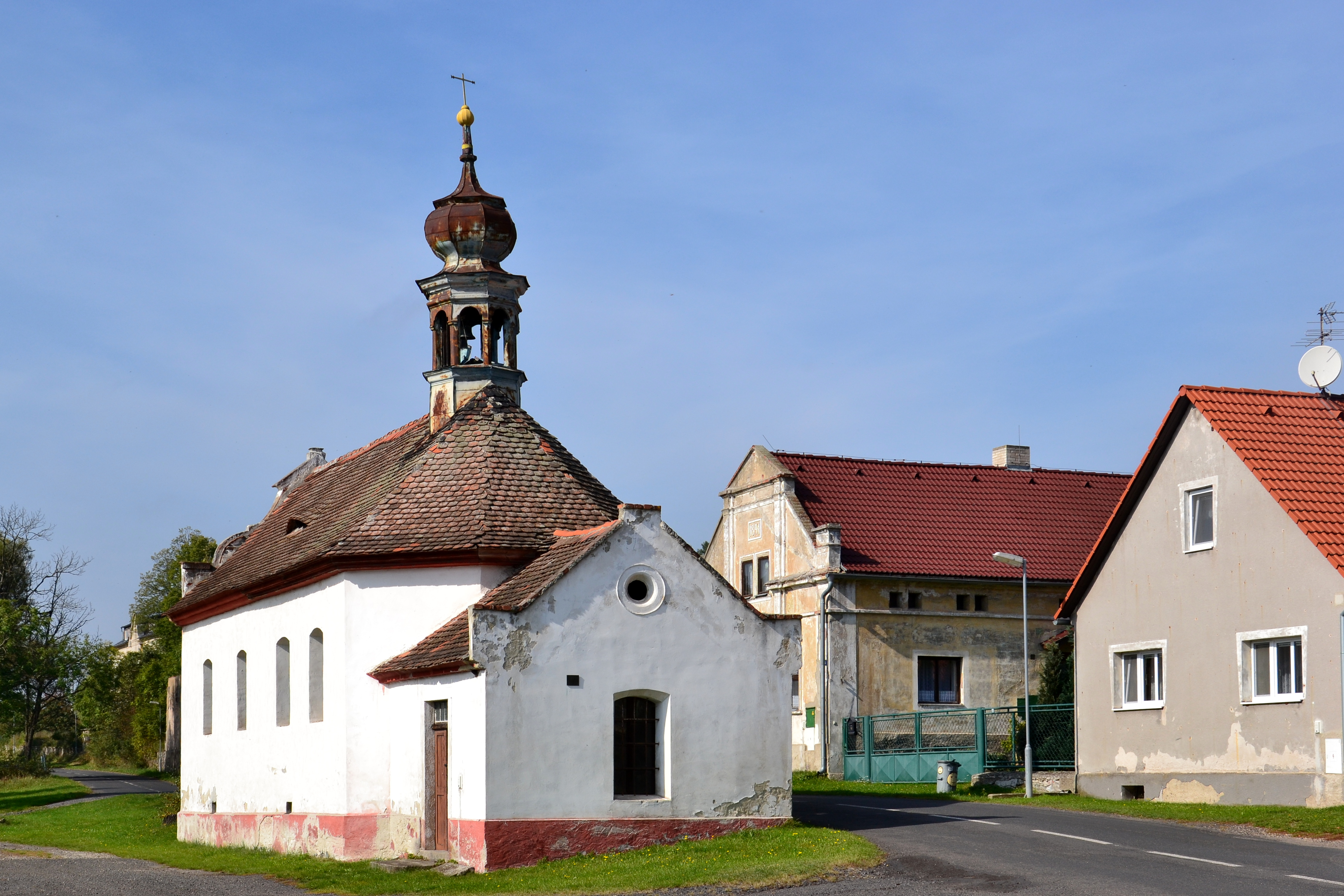 Kaple svaté Notburgy, střed obce, Podbořanský Rohozec.